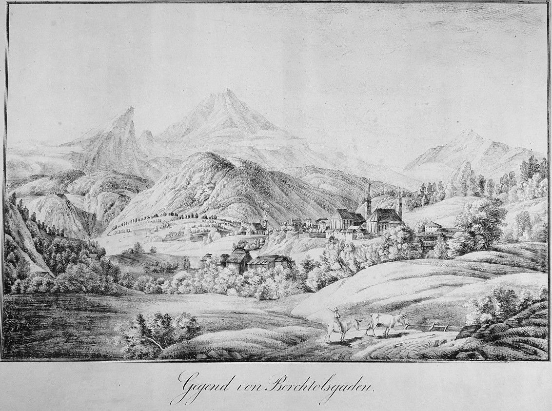 "Gegend von Berchtesgaden". Gesamtansicht mit dem Watzmann, im Vordergrund Hütejunge auf einem Esel und eine Kuh. Kreidelithographie von Kaspar Auer, 1816, 29 x 44 cm Inkunabel-Lithographie.